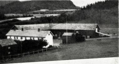 Fløan østre i daværende Skatval kommune. Reprofoto.